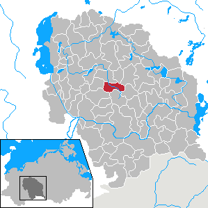 Zölkow in Mecklenburg-Vorpommern - District Parchim